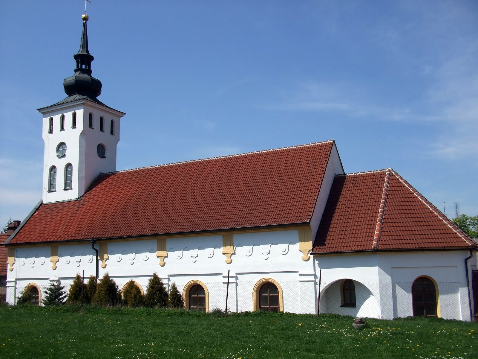 Koutský kostel